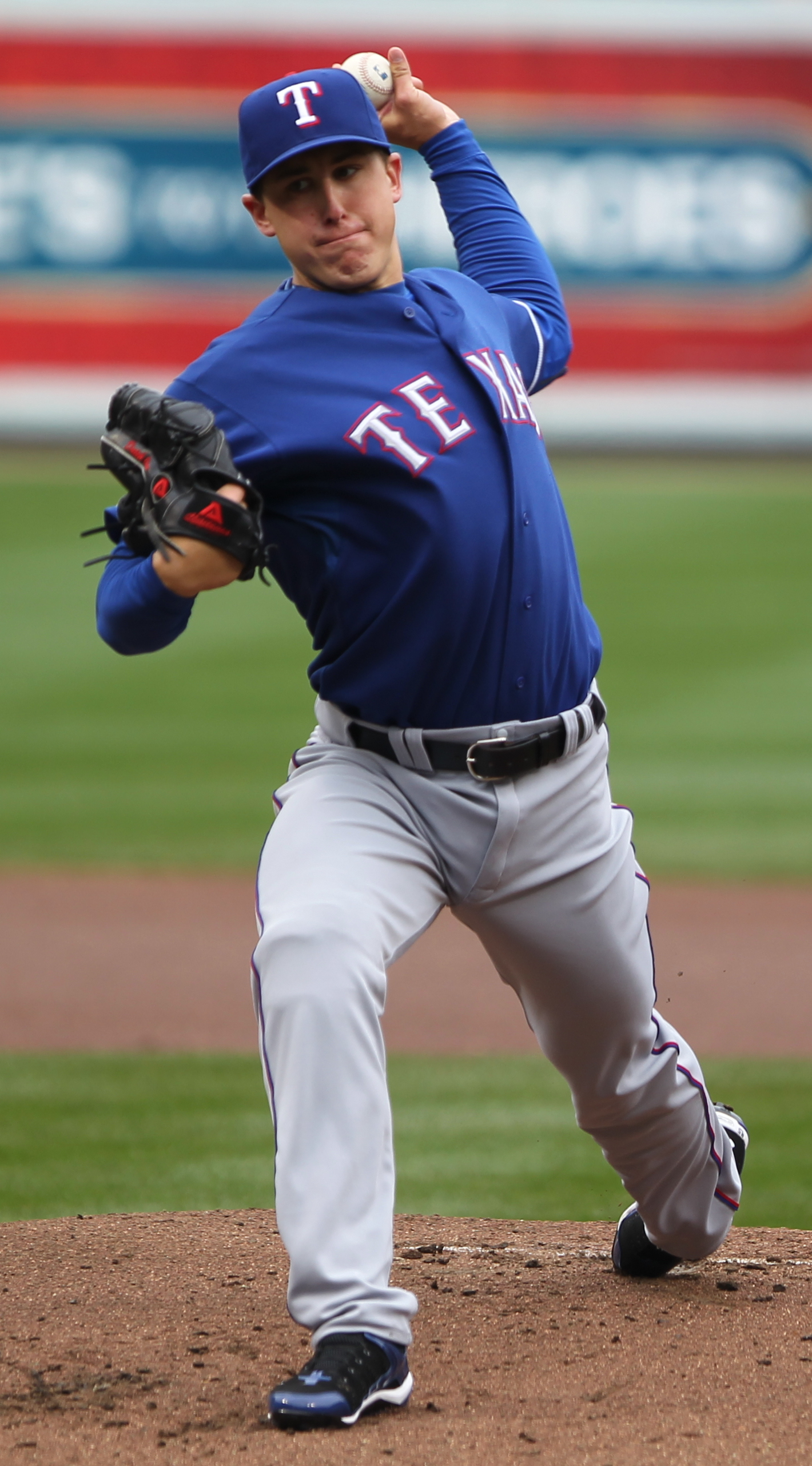 Derek Holland